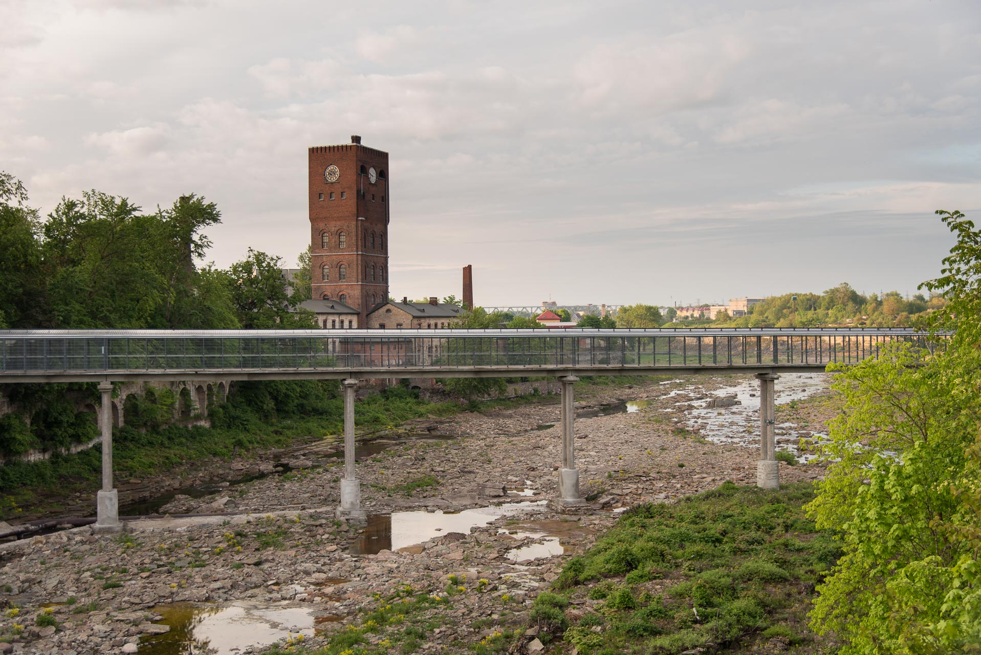 Narva